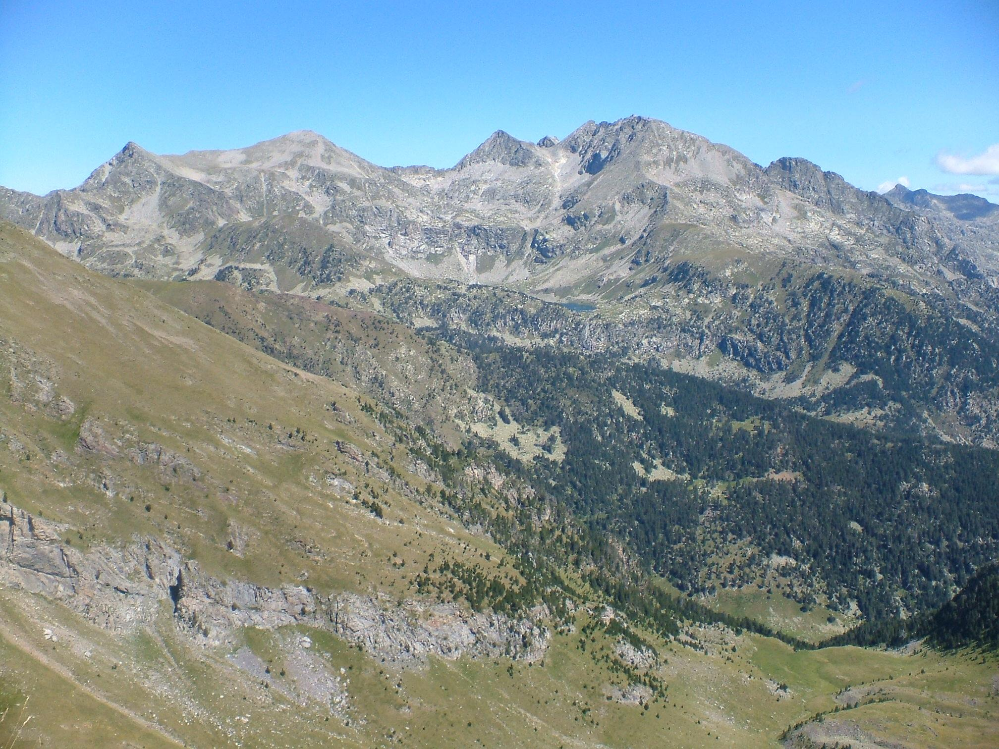 Circ de Gémena vist des de l'Aüt; la Vall de Boí, Alta Ribagorça, Catalunya